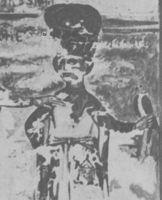 Детаљ повеље у Есфигменском манастиру на Светој гори, 1429. године